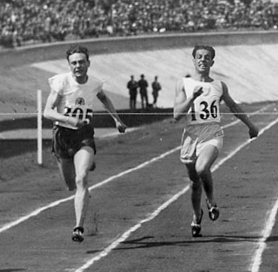 Olympische Spelen 1928 Amsterdam, Nederland : Wilhelm Hennings (links) en Angelos Lamprou (?).